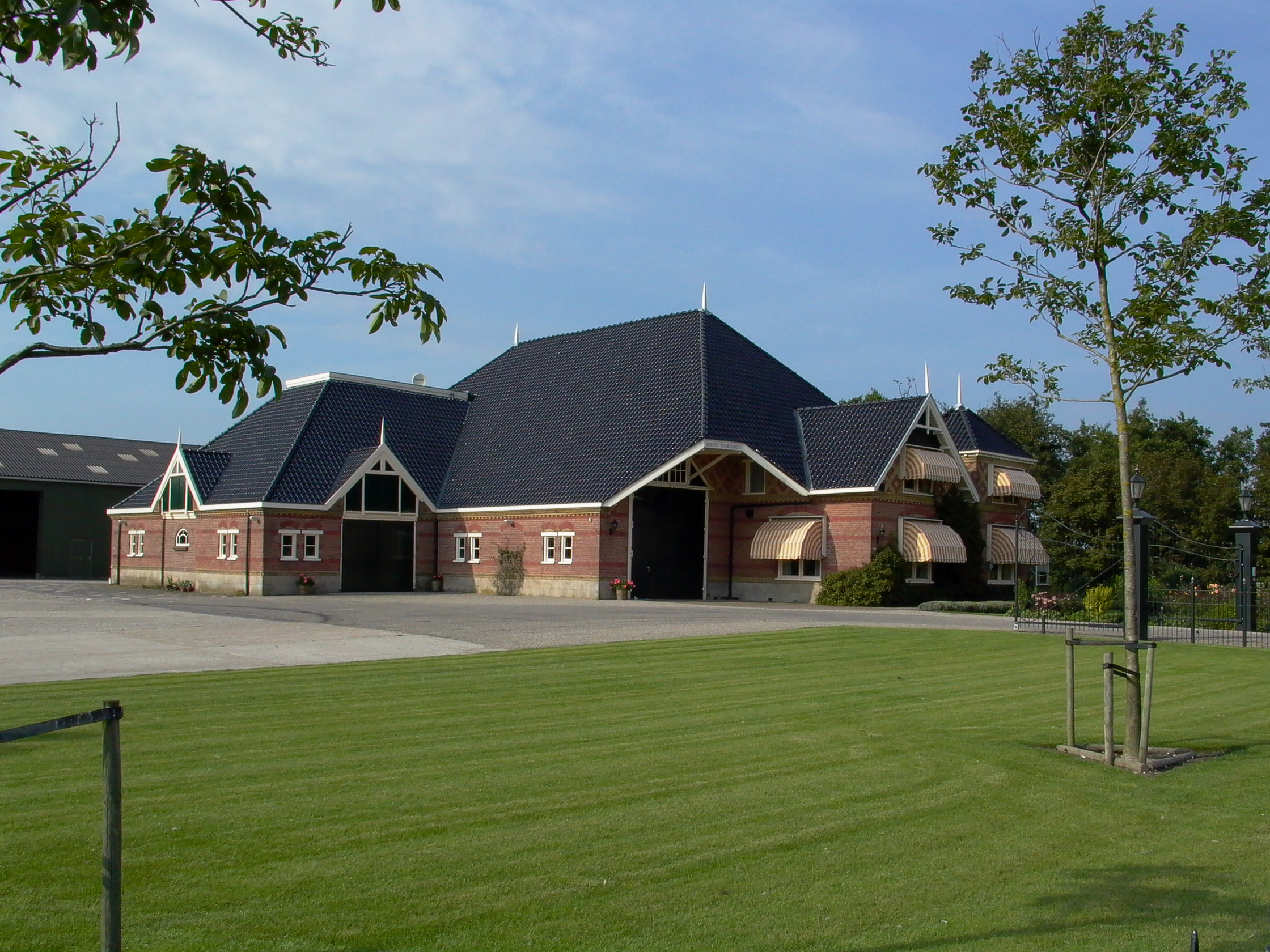 Hoeve Voorzorg in Boesingheliede (Haarlemmermeer). Foto: Daniel van der Ree, 26 augustus 2002